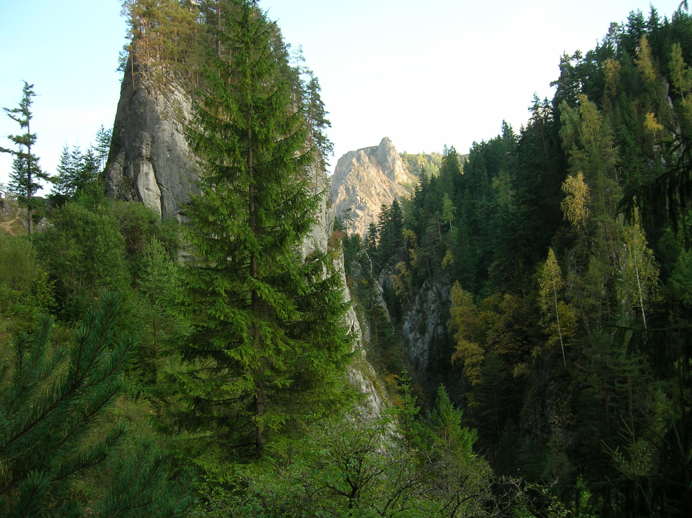 Cheile Şugăului, Rezervaţia Cheile Şugăului-Munticelu, Parcul Naţional Cheile Bicazului-Hăşmaş, Judeţul Neamţ, România